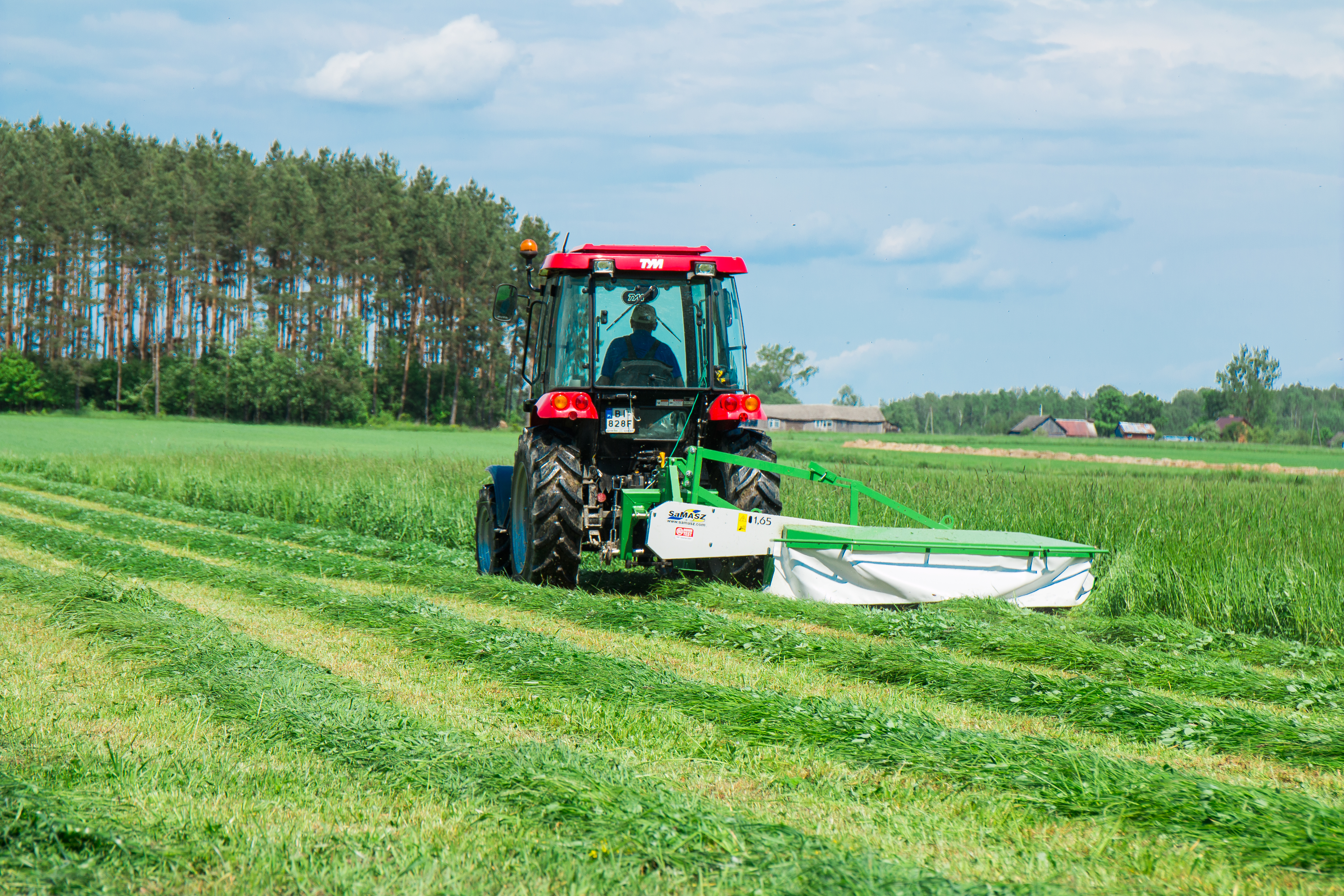 Kosiarka bębnowa tylna SaMASZ Z010